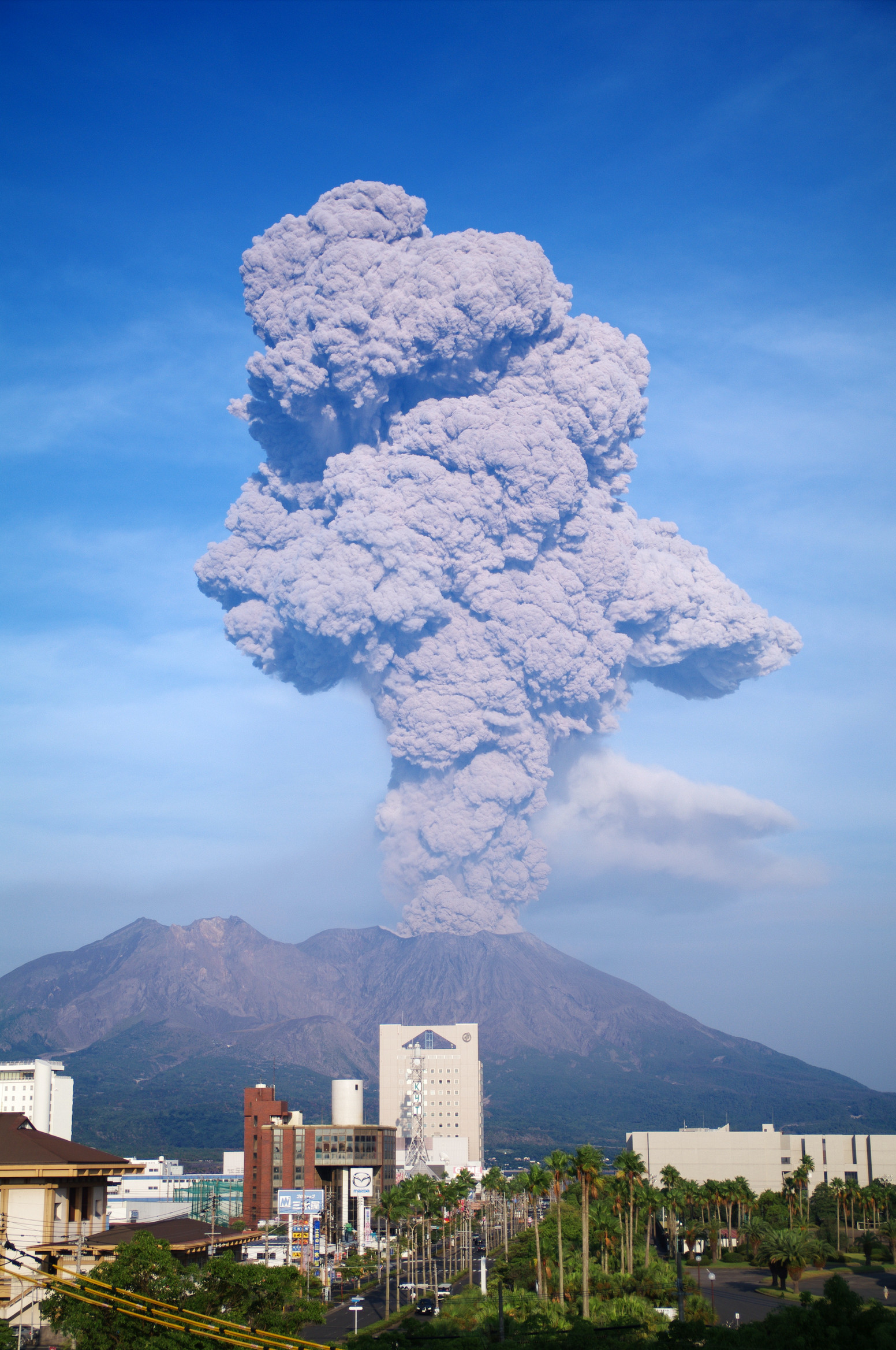 桜島 南岳噴火 2009年10月3日16時49分撮影